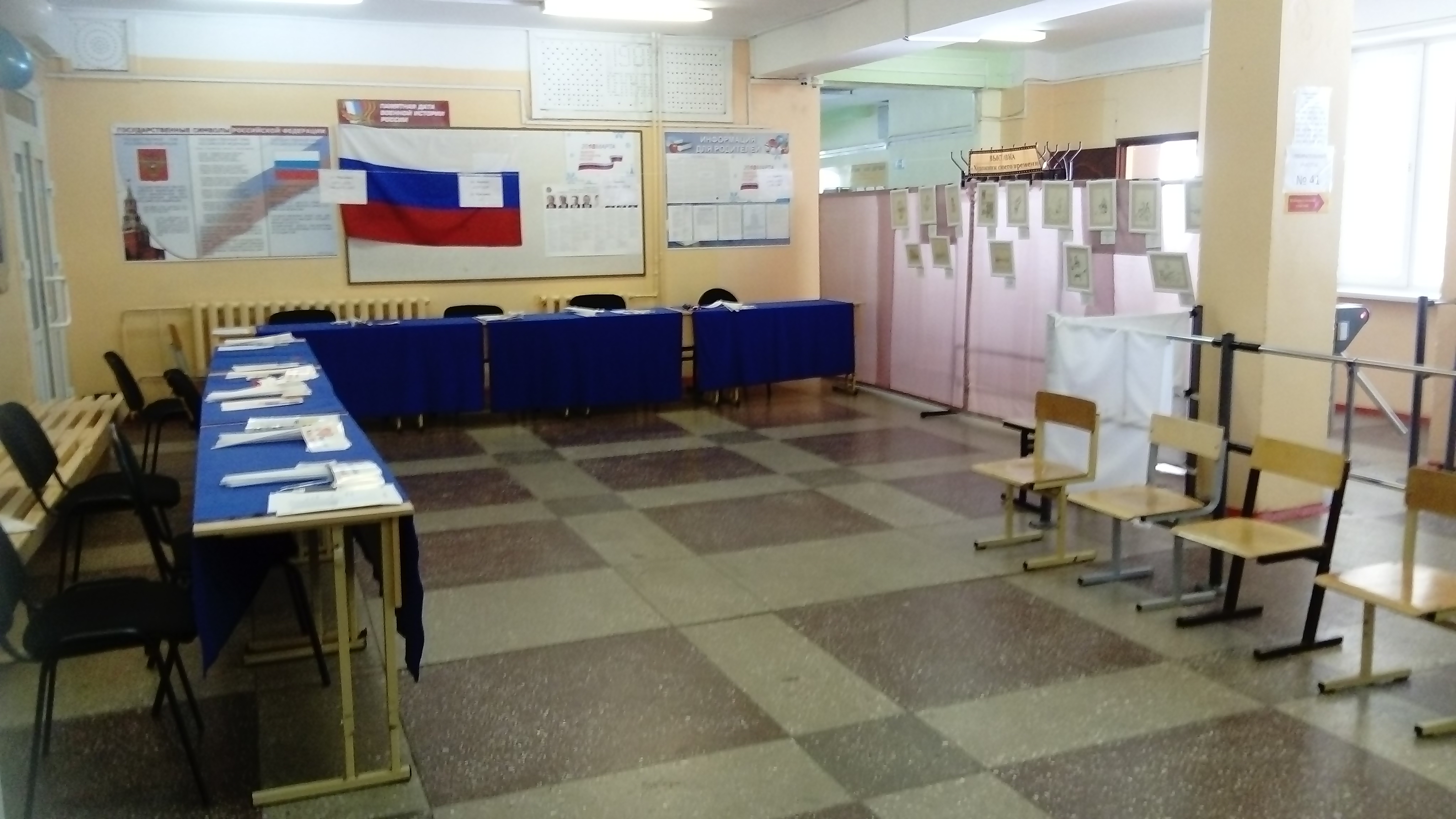 Избирательный участок за день до президентских выборов в России. Петропавловск-Камчатский, участок 42 (территория школы 40)